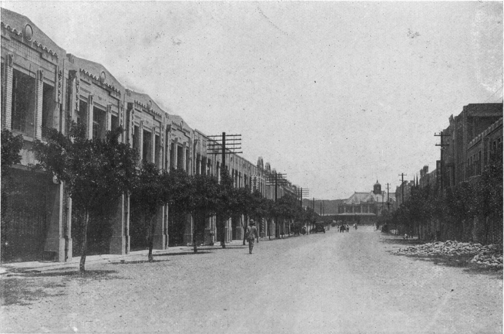 中文（台灣）: 位於新竹州中心，因人口達到4萬2500人（日本人5400人）而於昭和5年1月20日升格為市。